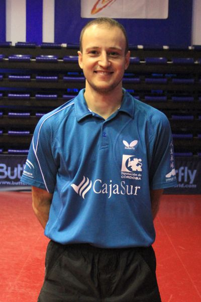 Carlos Machado con la equipación del CajaSur Priego.